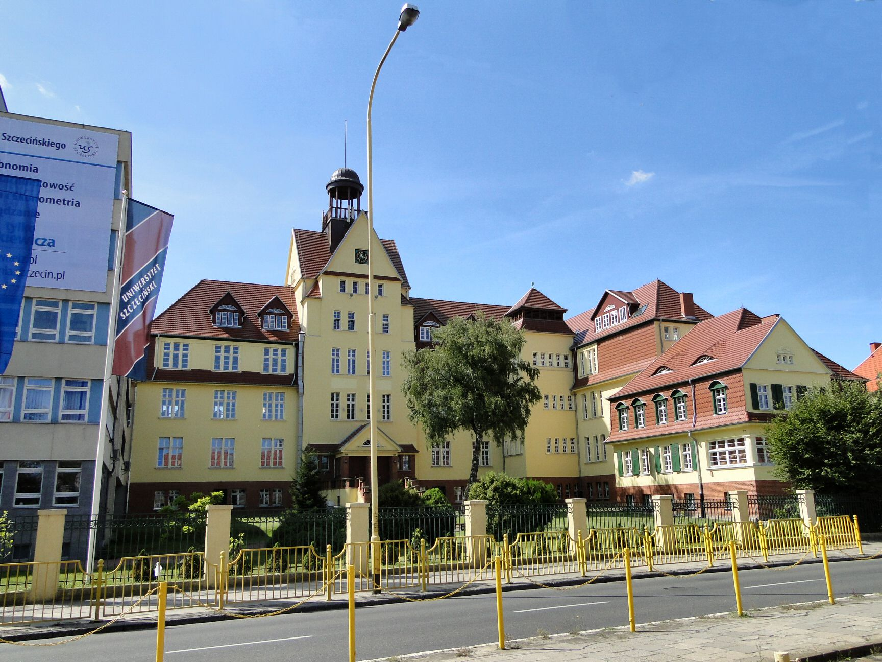 Siedziba Wydziału Nauk Ekonomicznych i Zarządzania Uniwersytetu Szczecińskiego przy ulicy Mickiewicza 64 w Szczecinie.